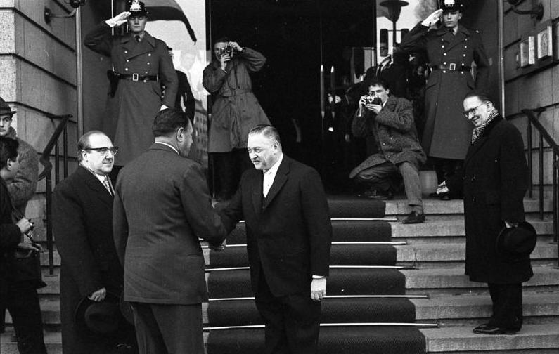 Pakistanischer Staatspräsident Ayoub Khan zu Besuch in Deutschland Vor dem "Parkhotel" Düsseldorf